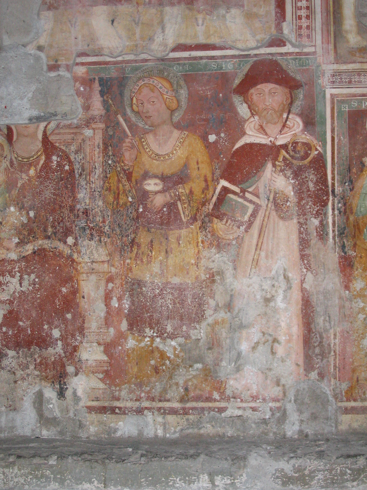 Santa Lucia e San Girolamo, affresco di incerta attribuzione, del XIV secolo. Chiesa di San Giorgio in Lemine (ad Almenno San Salvatore, Bergamo). Fotografia di Giorces.